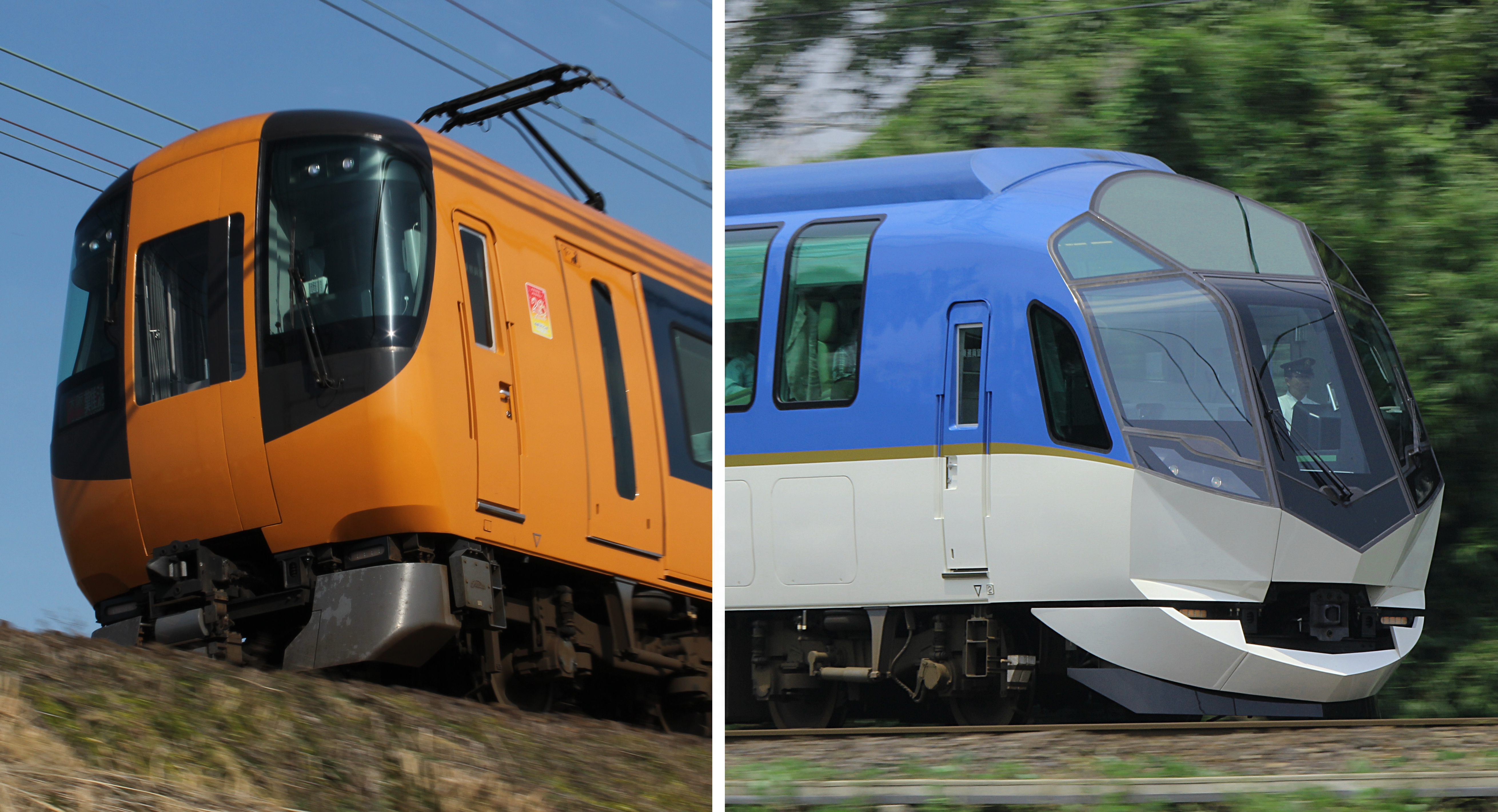 近鉄22600系と50000系